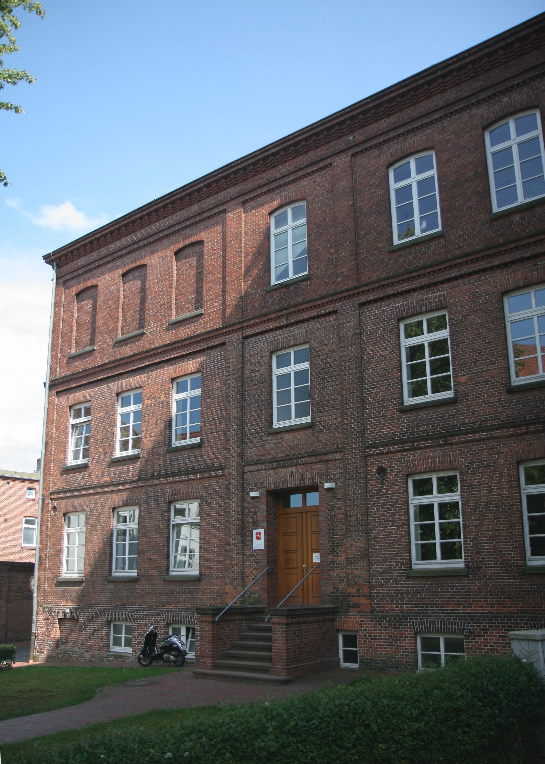 Nebengebäude des Amtsgerichts Stade, Wilhadikirchhof 2 in Stade.